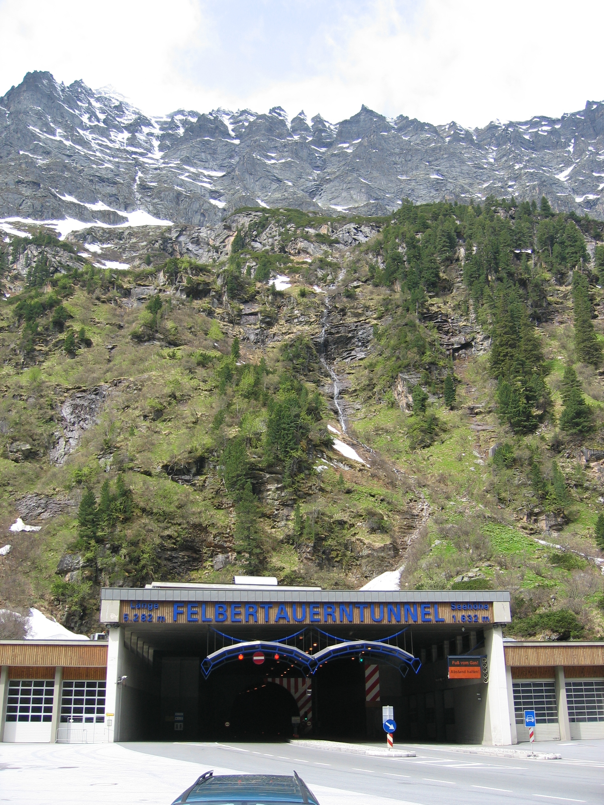 Severní portál Felbertaurského tunelu